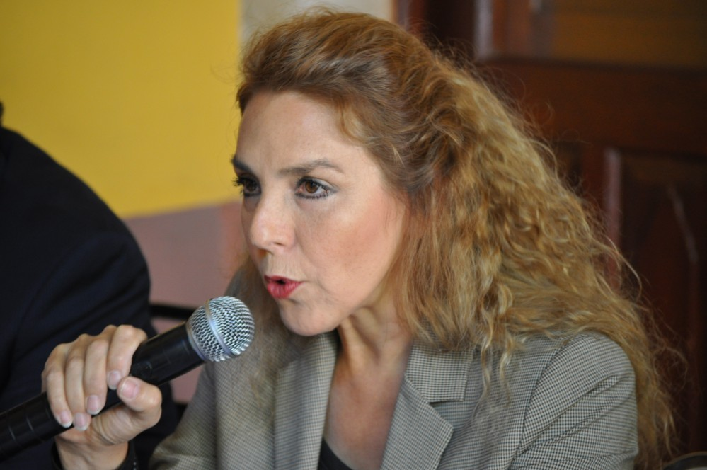 En la presentación de Desaparecidas de la morgue en Chihuahua.